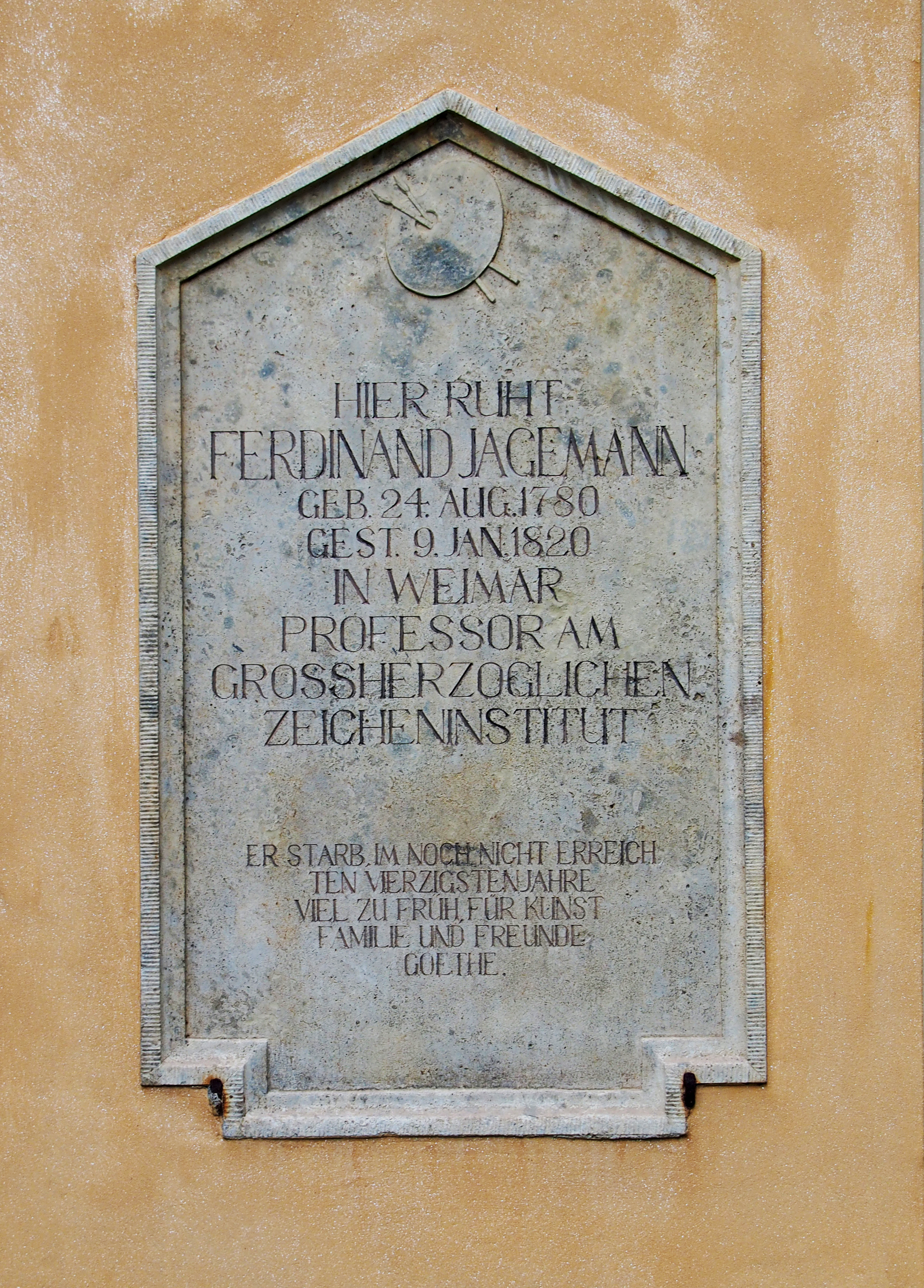 Grabstein von Ferdinand Jagemann Jakobskirchhof in Weimar